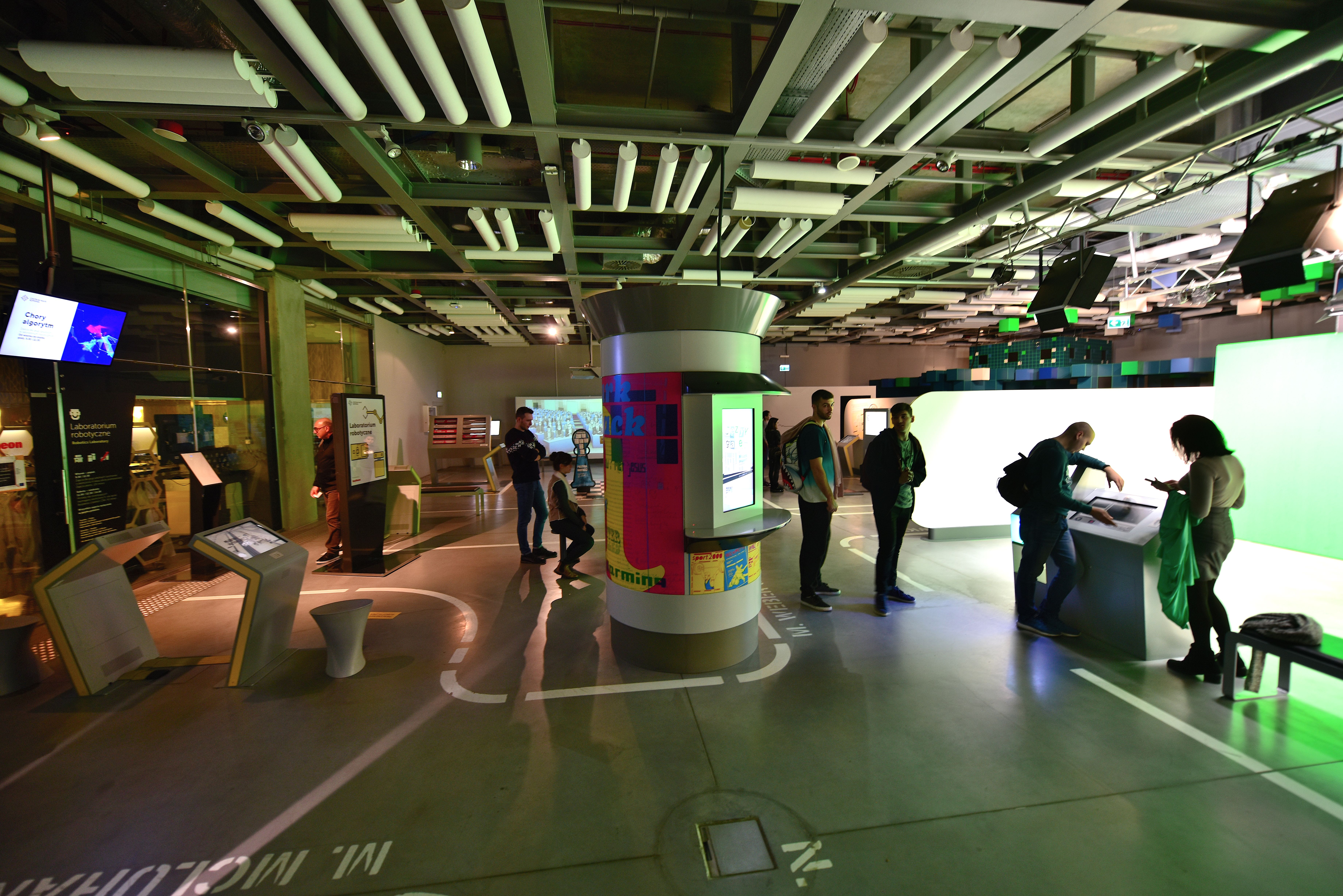 Centrum Nauki Kopernik w Warszawie